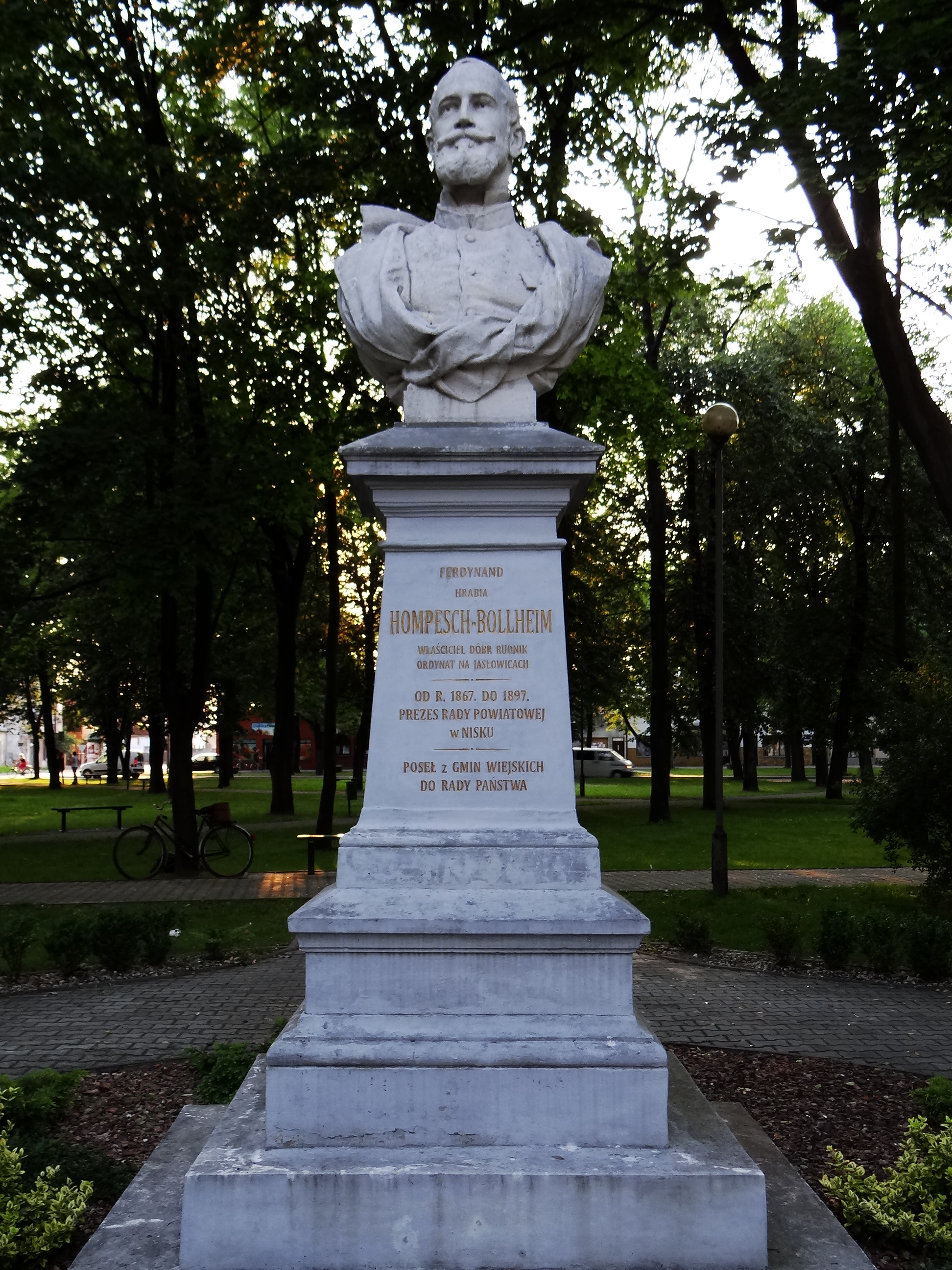 Zdjęcie wykonane w miejscowości Rudnik nad Sanem.